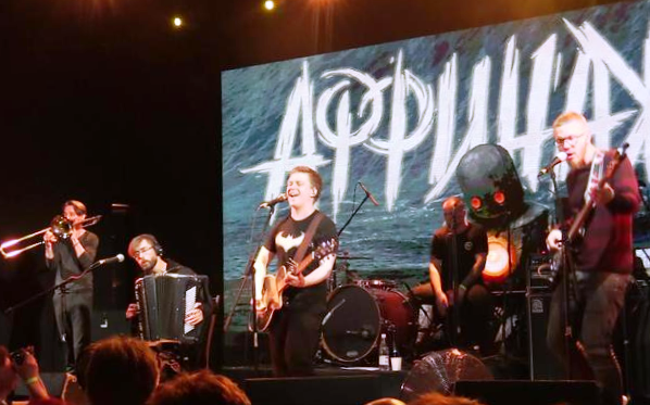 Группа «Аффинаж» на 4-м Благотворительном Фестивале «Разные Люди — Рок-музыканты помогают детям», клуб «Космонавт», Санкт-Петербург, 15 мая 2018 года.